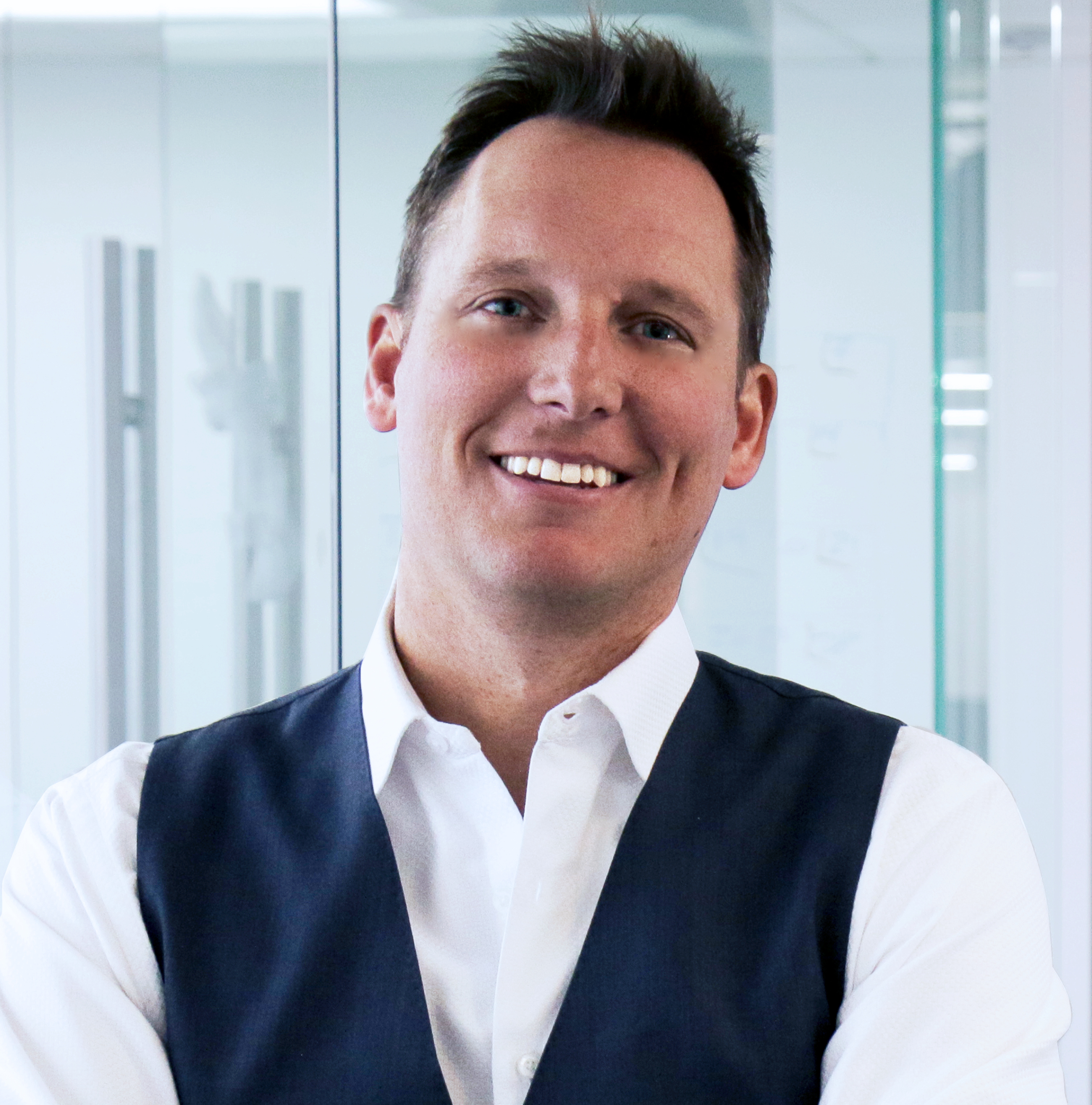 Brant Pinvidic